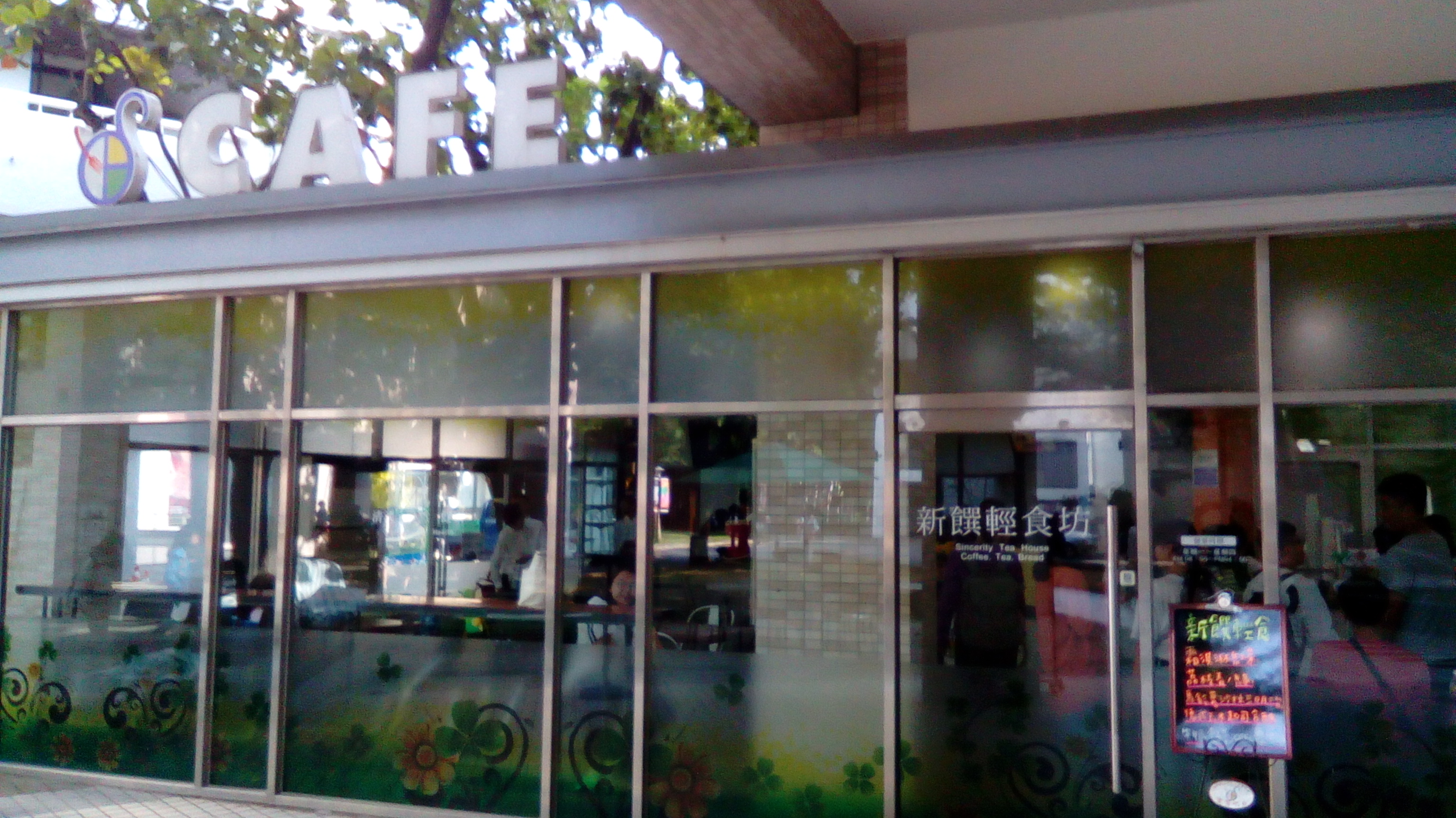 位於LT(生科)大樓一樓